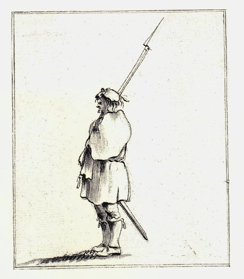 Набросок, сделанный неизвестным автором во время якобитского восстания 1745 года в Шотландии, в г. Пеникуик.